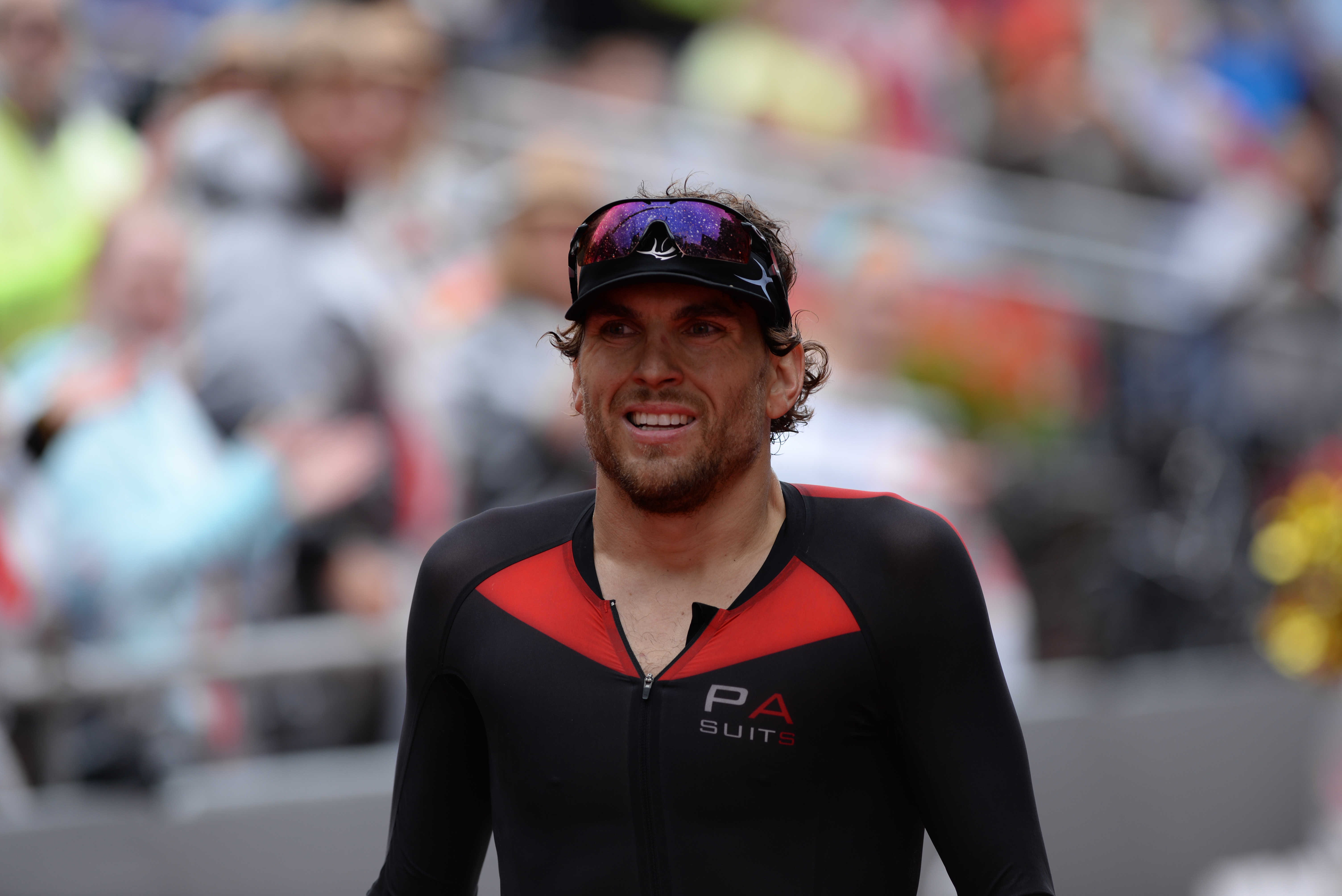 Ironman 2016, Starterlisten unter